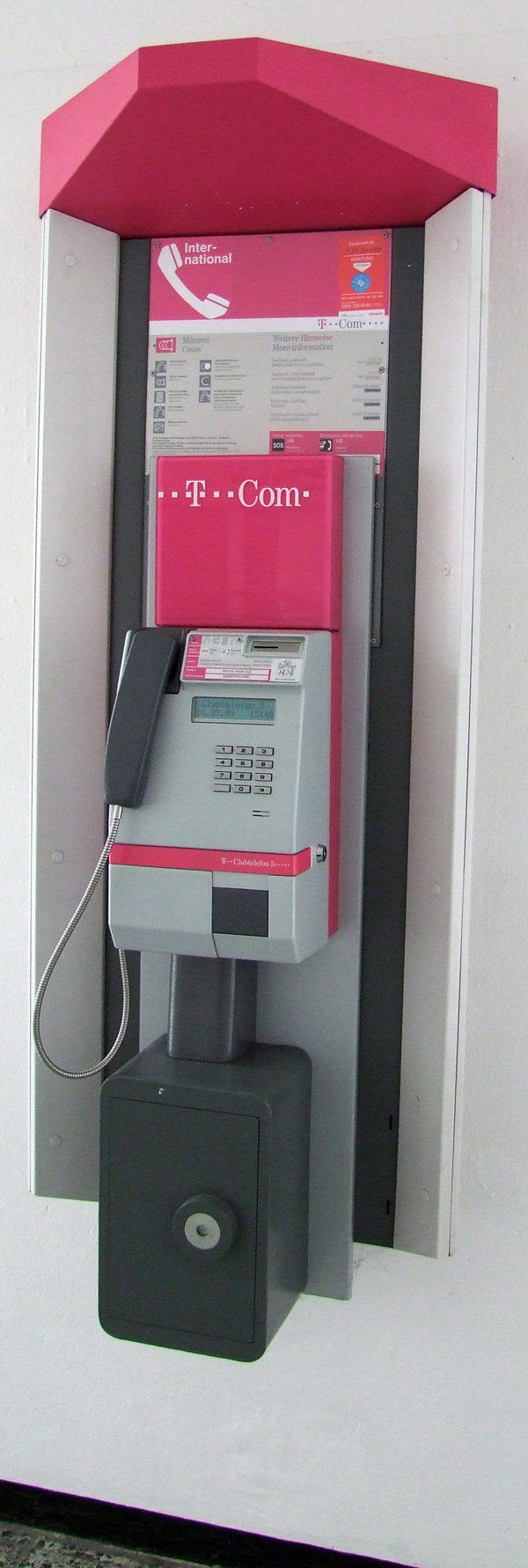 Clubtelefon 5 hier in der Ausführung als öffentliches Telefon, unter dem Telefon befindet sich die Geldsammelkassette (Geldsafe) die einem eventuellen Vandalismus vorbeugen soll